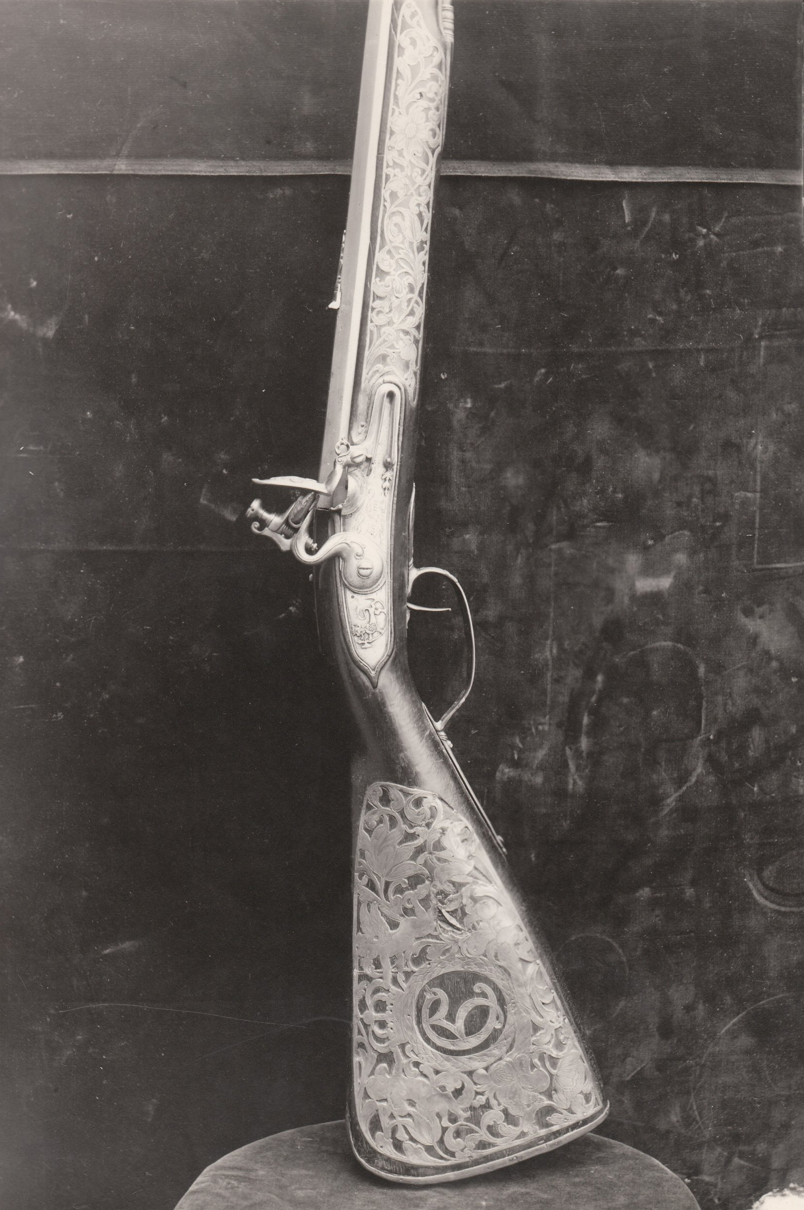 Format: Fotopositiv Dato / Date: 1897 Fotograf / Photographer: Erik Olsen (1835 - 1920) Sted / Place: Trondheim Wikipedia: Christian V av Danmark og Norge Wikipedia: Tøjhusmuseet Eier / Owner Institution: Trondheim byarkiv, The Municipal Archives of Trondheim Arkivreferanse / Archive reference: Tor.H41.B37.F2771 Merknad: Fra utstillingen i anledning Trondhjems 900-årsjubileum i 1897. Utstillingstekst i Trondhjems 900 Aars Jubilæum: Katalog for Den Historiske Udstilling i Trondhjem 1897: 1079. Gevær, forfærdiget til Kong Christian d. 5te af Lars Berg i Trondhjem (jfr. No. 93-94). 24-lødig Rifle med Flintelaas. Piben, 3 3/4" lang, med 8 Riflegange, er 8-kantet. Paa Laaseblikket er den norske Løve skaaret i Relief, hvoros det har graveret: Lars Berrig, Trundhiem. Skjæftet af Valnøddetræ har paa Forskjæftet en Del gjennemstukne og graverede Messingbeslag; paa den brede og massive Kolbes ene Side findes et kronet C5 i en Laurbærkrans, paa den anden Side den norske Løve i en lignende Krans og med Krone over, begge i gjennembrudt graveret Messing; den graverede Kappe, den udfilede Haandbøile og det øvrige Beslag er alt af Messing. Ladestokken har foroven en skrueskaaret Jernring med Kugleleie. *Kjøbenhavns Tøihus.